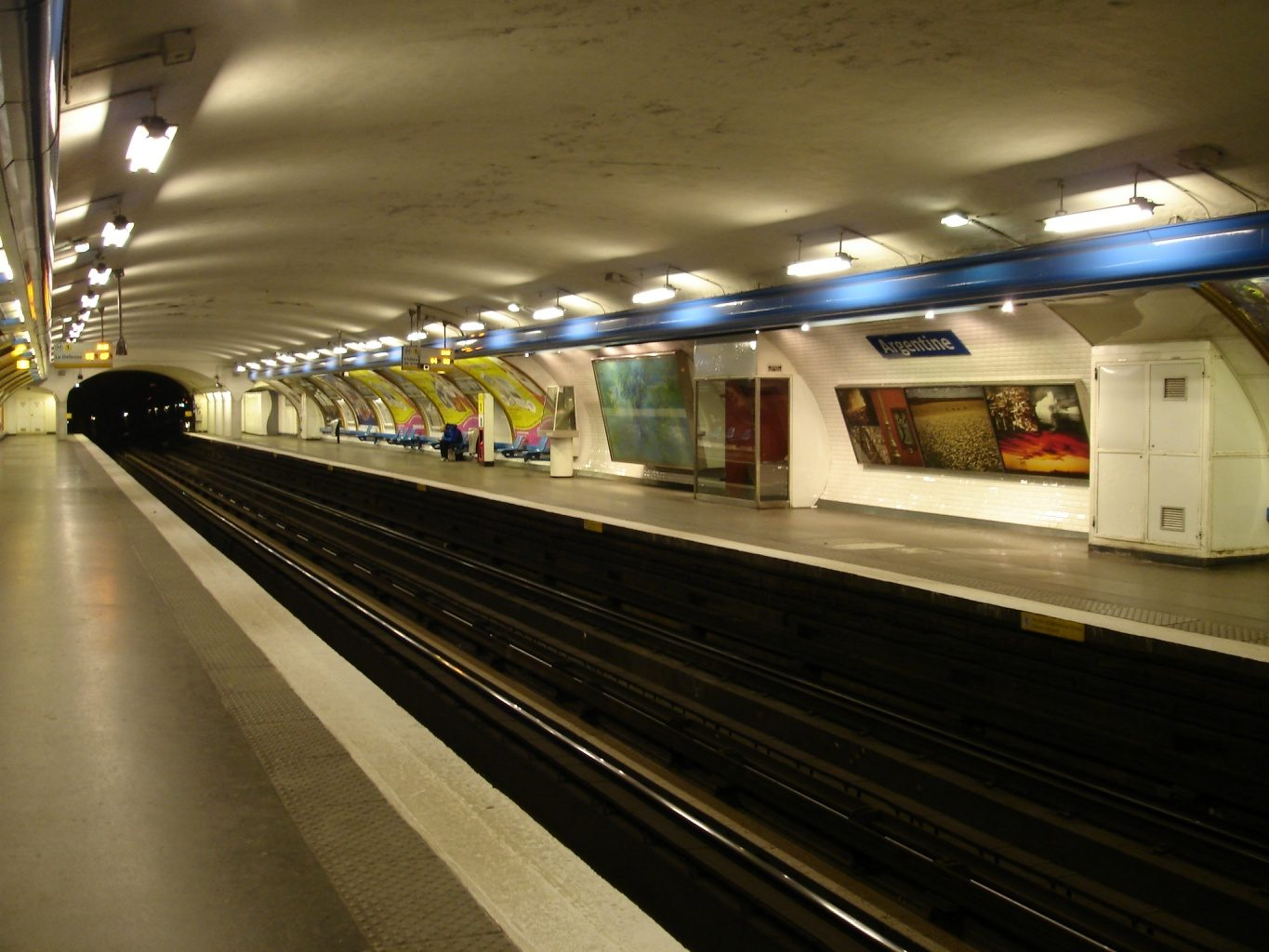 Métro de Paris - ligne 1 - Station Argentine (France) - Décembre 2006 Photo personnelle de clicsouris